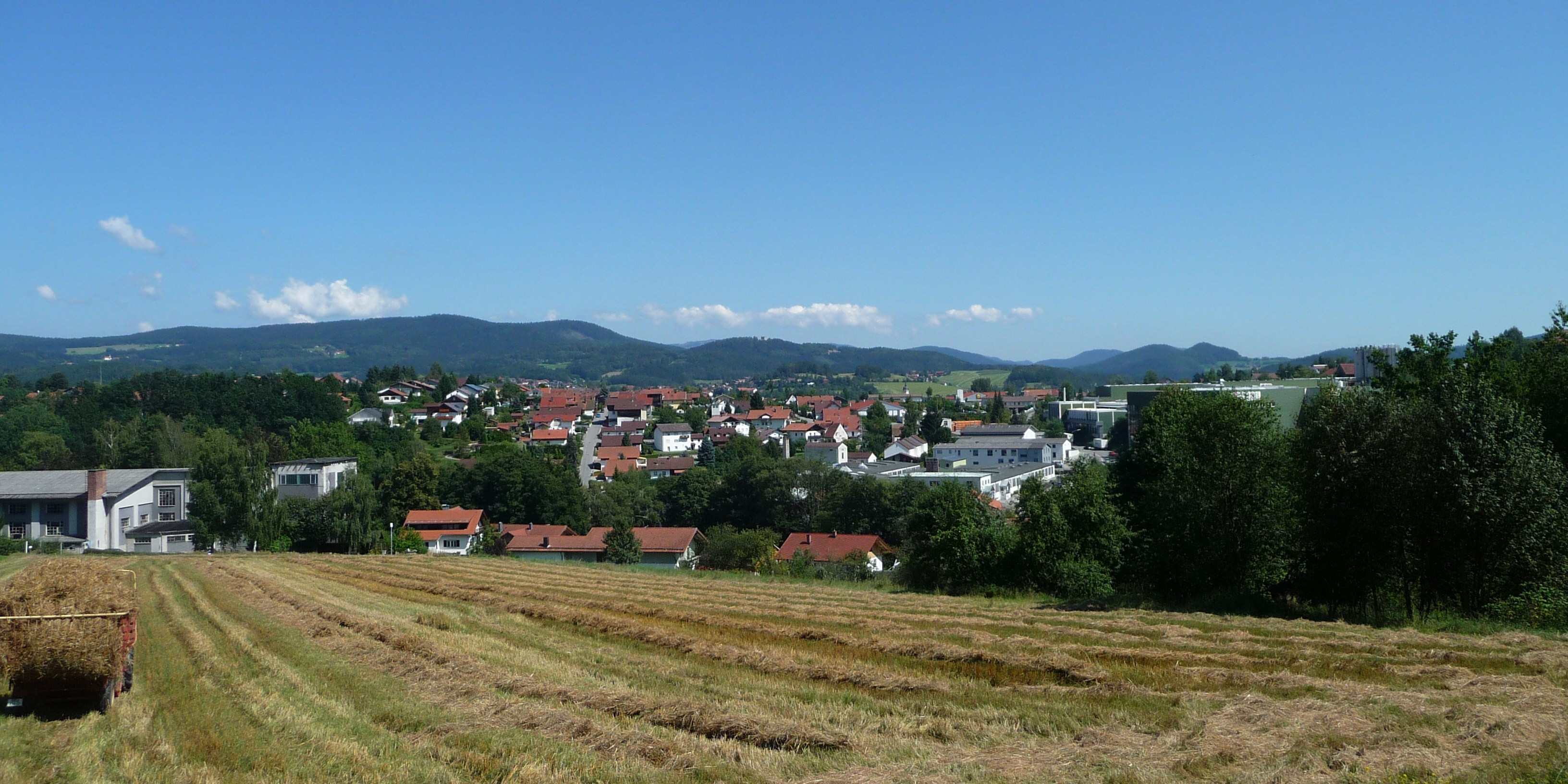 Blick auf Viechtach